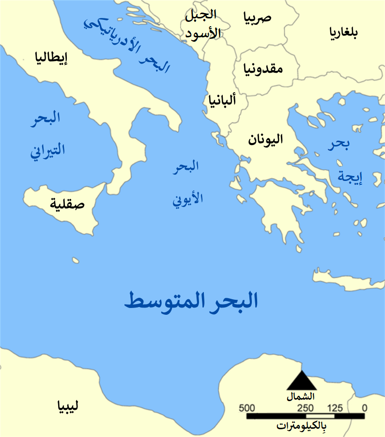 خريطة تُبيِّن موقع البحر الأيوني.